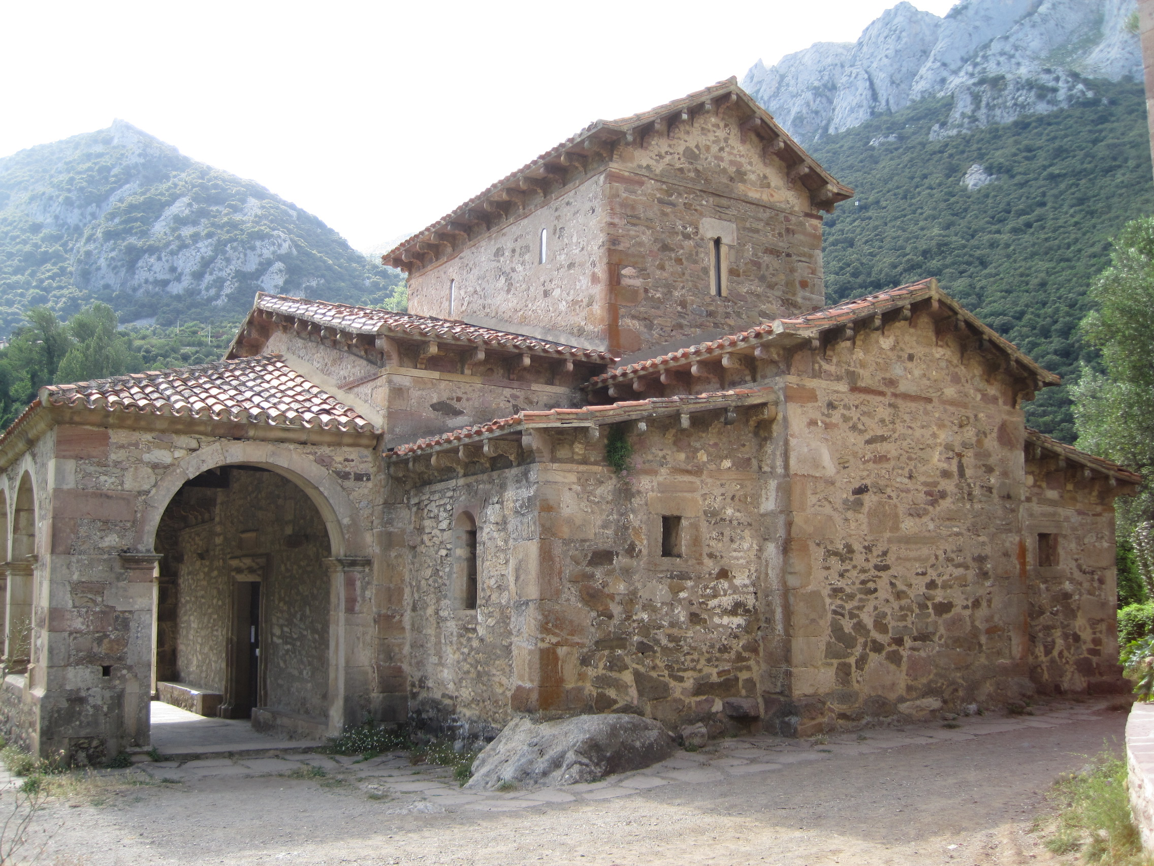 Iglesia de Santa María de Lebeña (Cantabria, España)